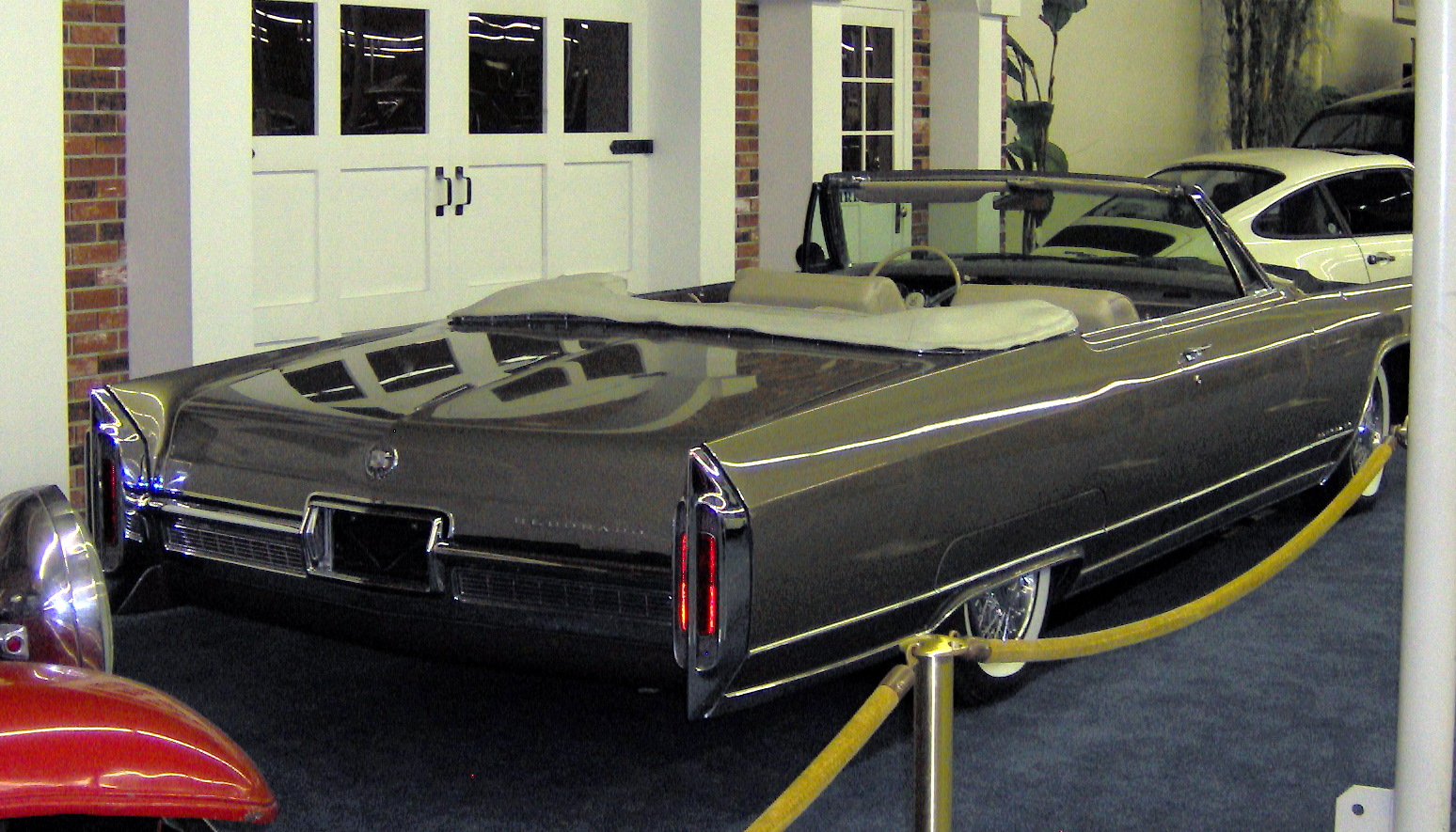 1966 Cadillac Eldorado Convertible